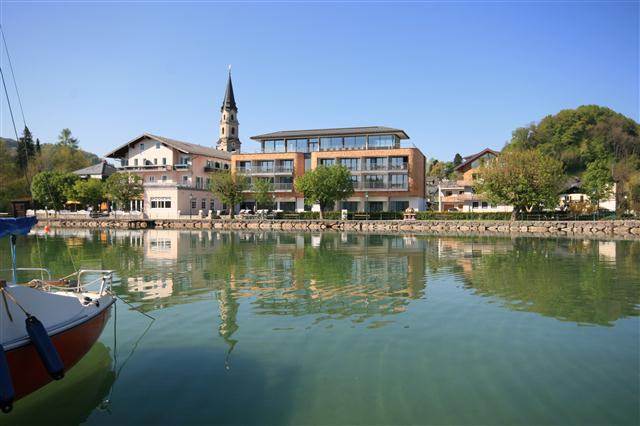 Blick auf das Hotel Seewirt in Mattsee am Südufer des Mattsees